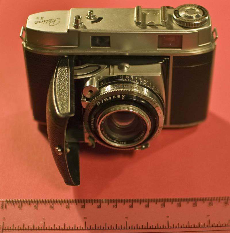 Kodak camera Retina II c